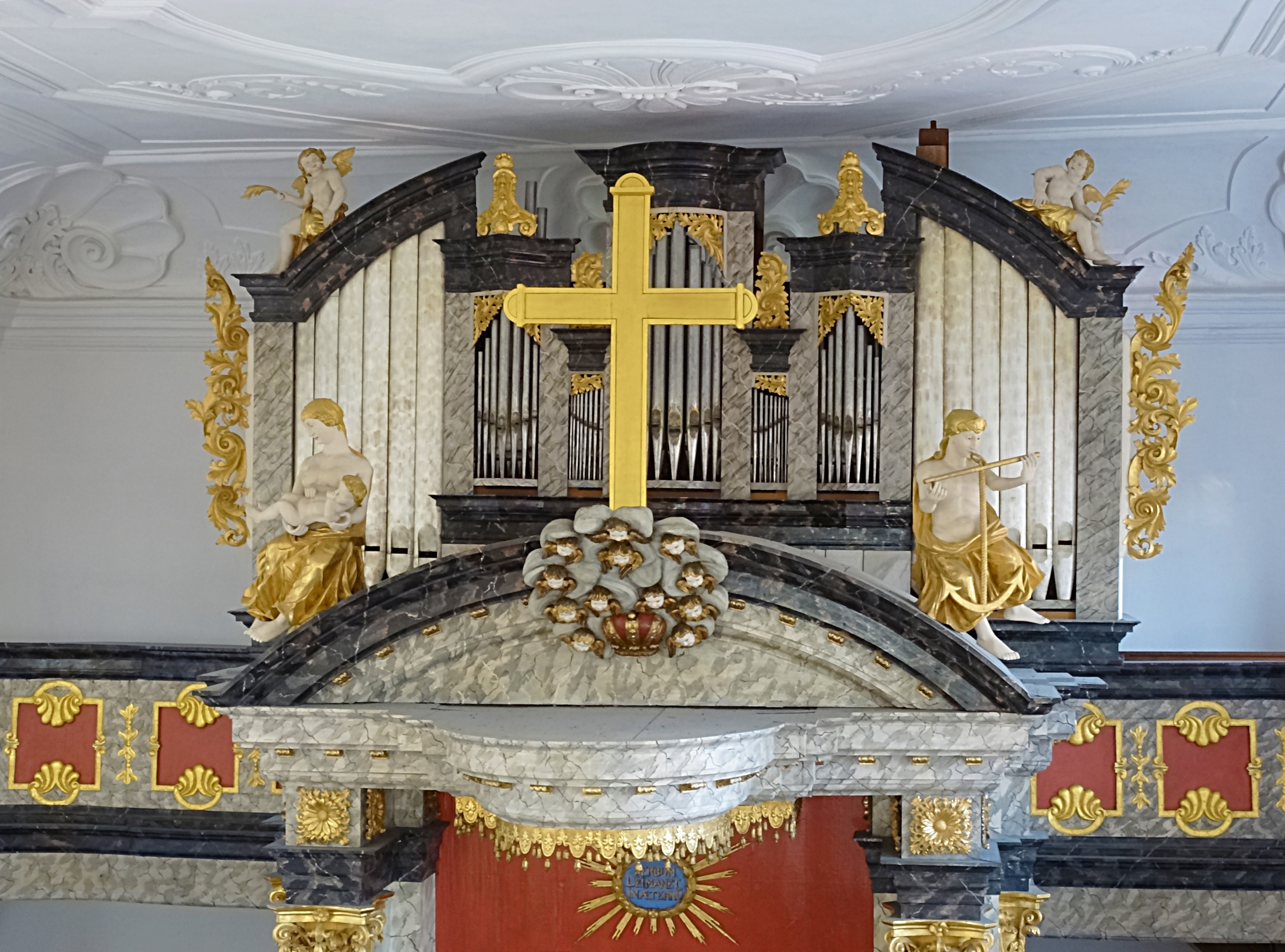 Barocke Orgel der Schlosskirche in Völkershausen von Johann Ernst Döring (1730), IP/11, restauriert durch Hey-Orgelbau 1988